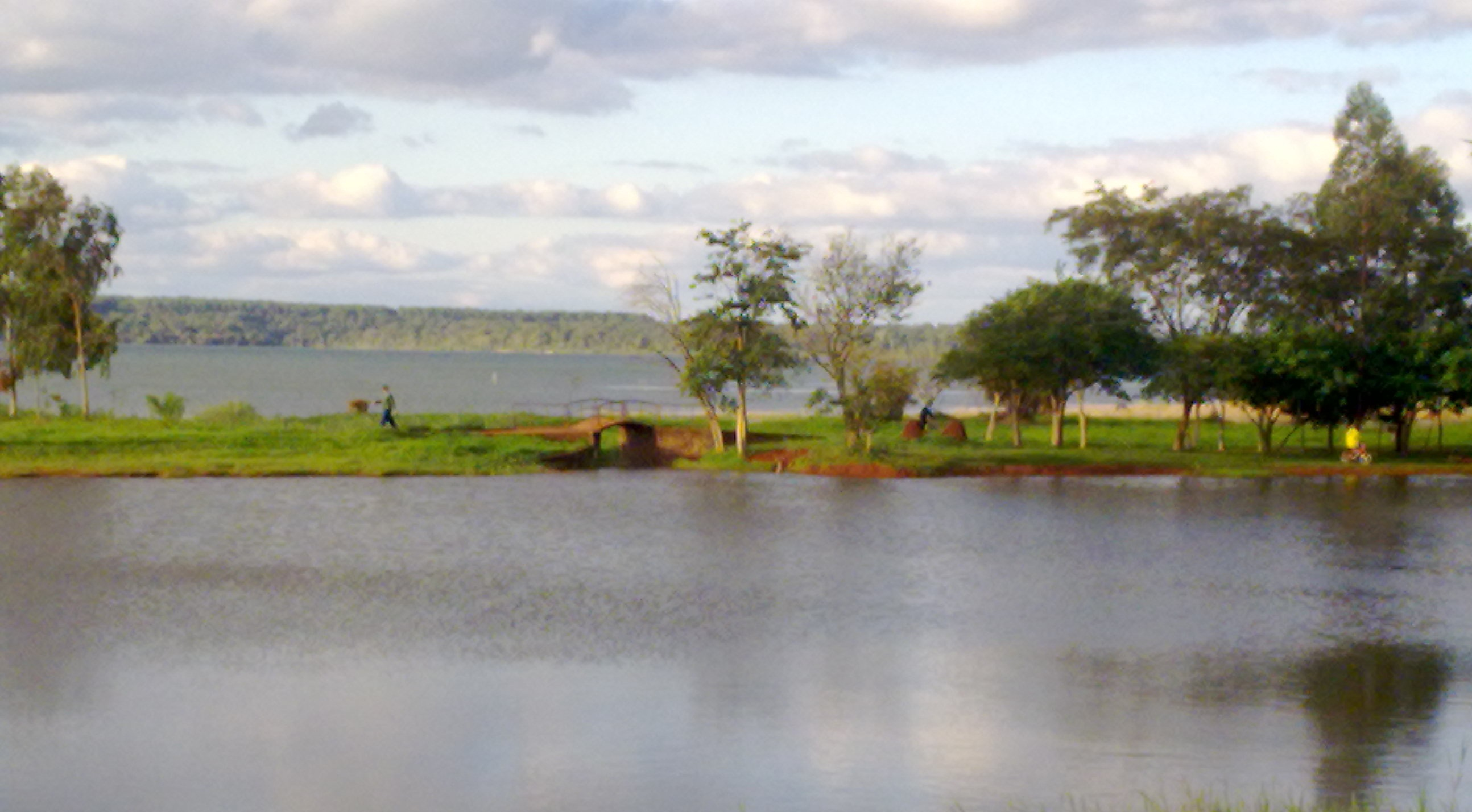 Laguna del Barrio Area 6 (+ lago Itaipú), Hernandarias, Paraguay